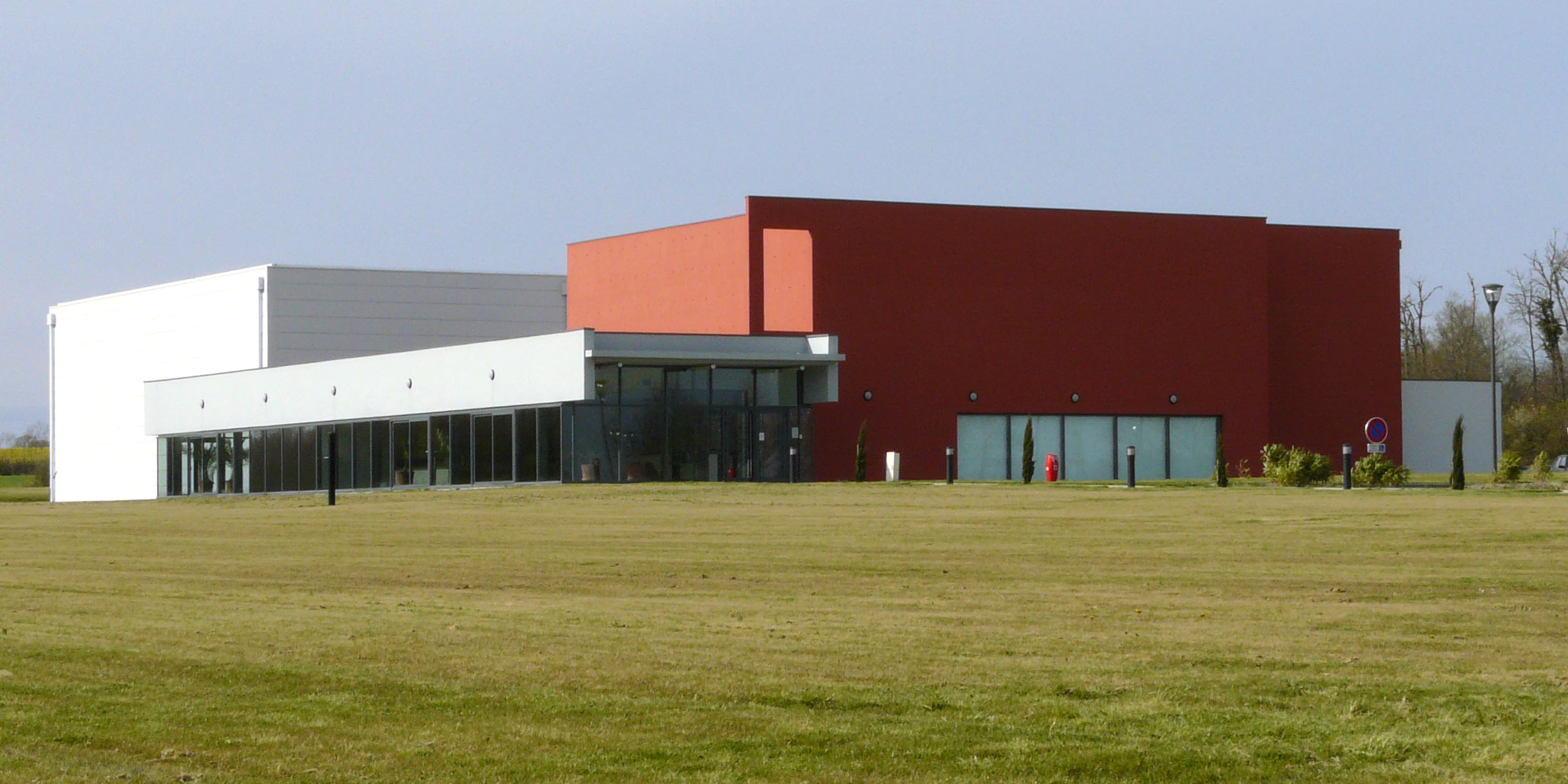 Complexe sportif et culturel du Phénix, Mésanger (44)